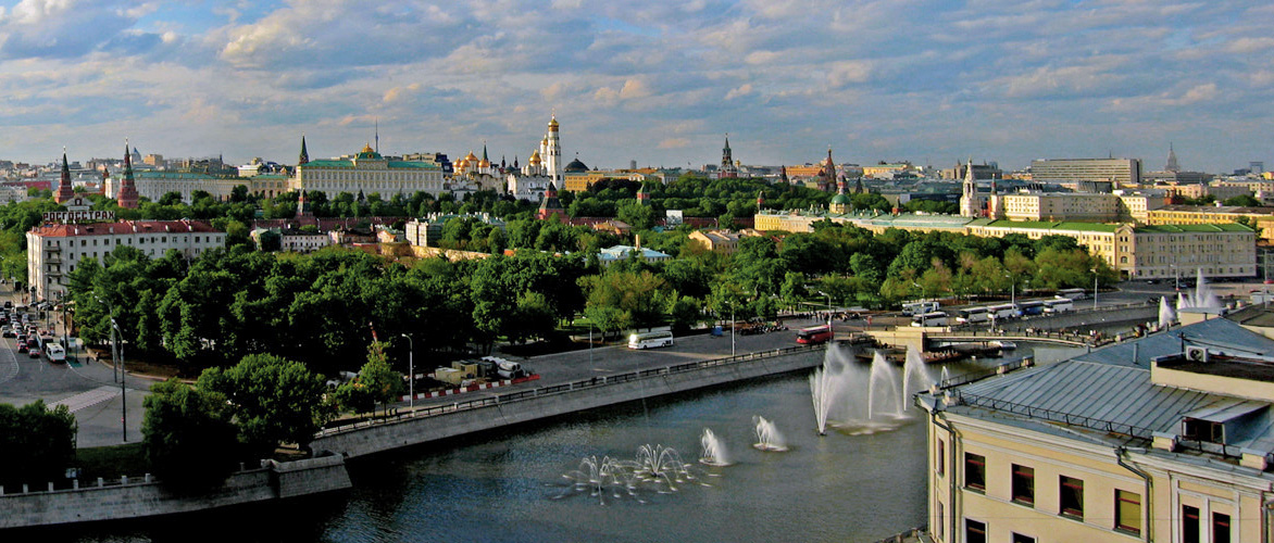 Вид на Болотную площадь.